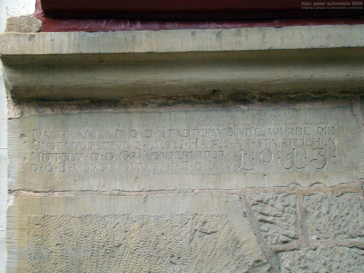 Detail am Baumannschen Haus in Eppingen, Inschriftentafel der Sanierung 1913